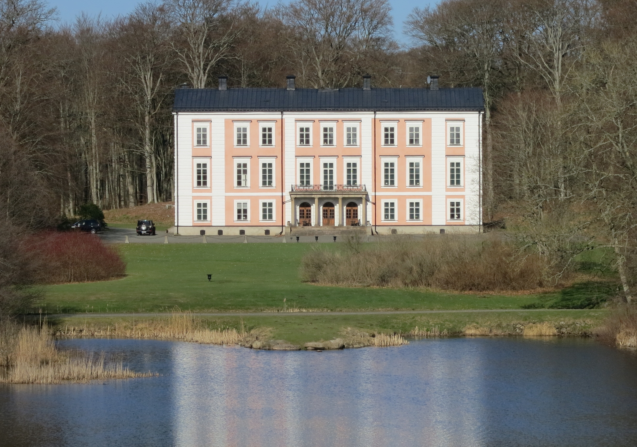 Ovesholms slott, mars 2014